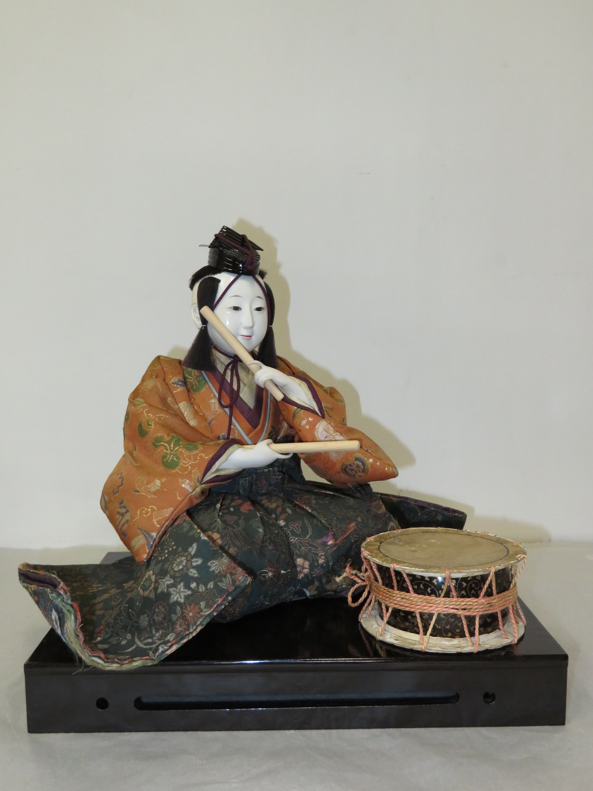 2018年2月27日-3月18日 東京国立博物館展示風景